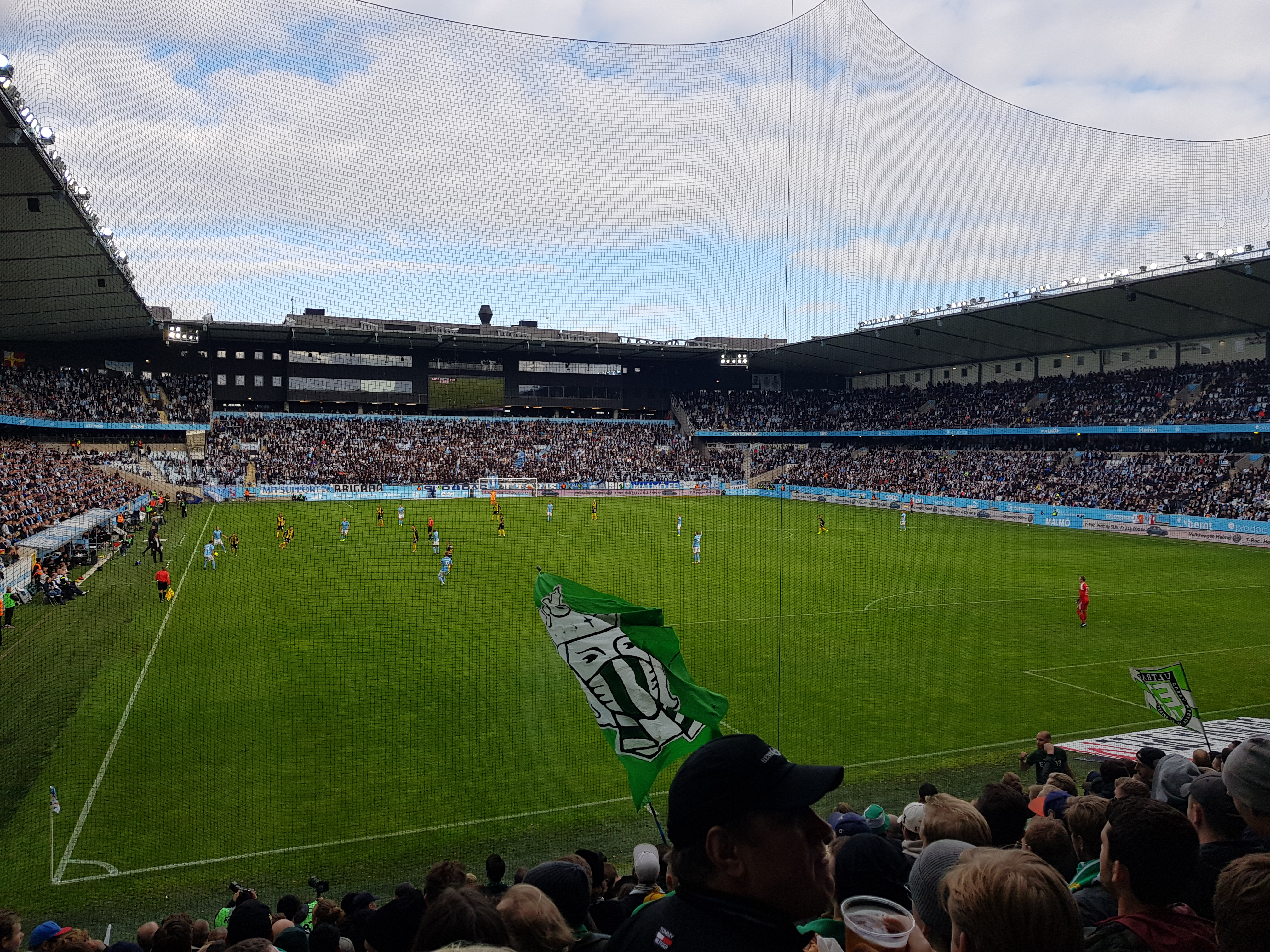 Match mellan Malmö FF och Hammarby IF, 2018-10-20, Stadion.